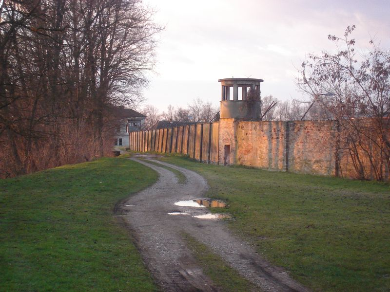 Zidine